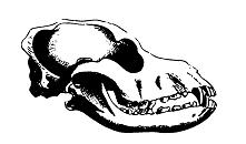 Skull of Spaniel